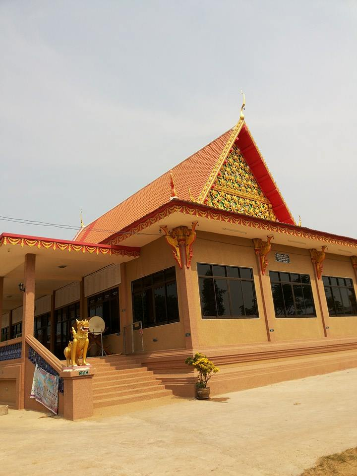 ภาพศาลาการเปรียญหลังใหม่ซึ่งสร้างเสร็จเมื่อปี 2013